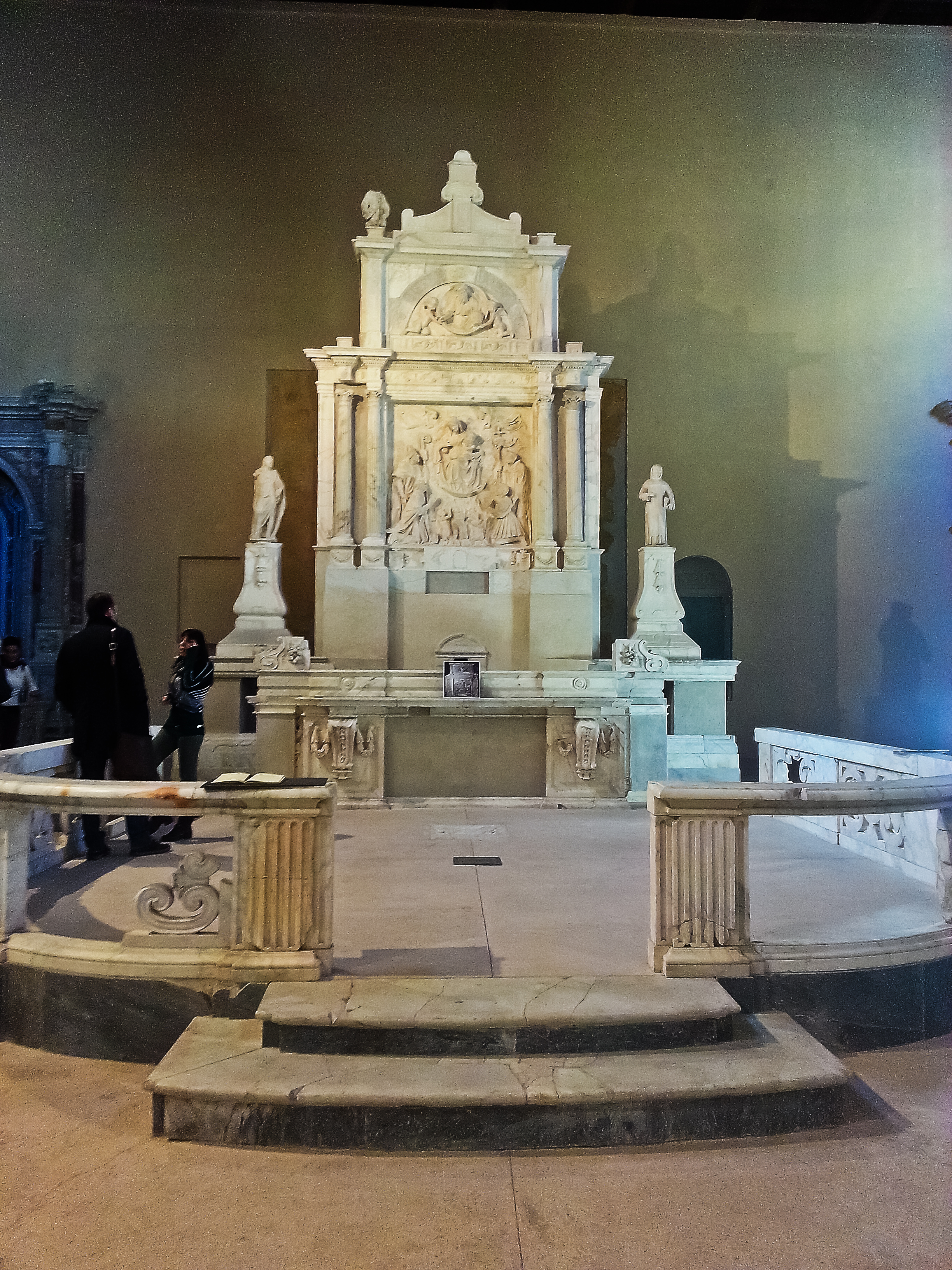 Altare di Girolamo Santacroce spogliato dai furti